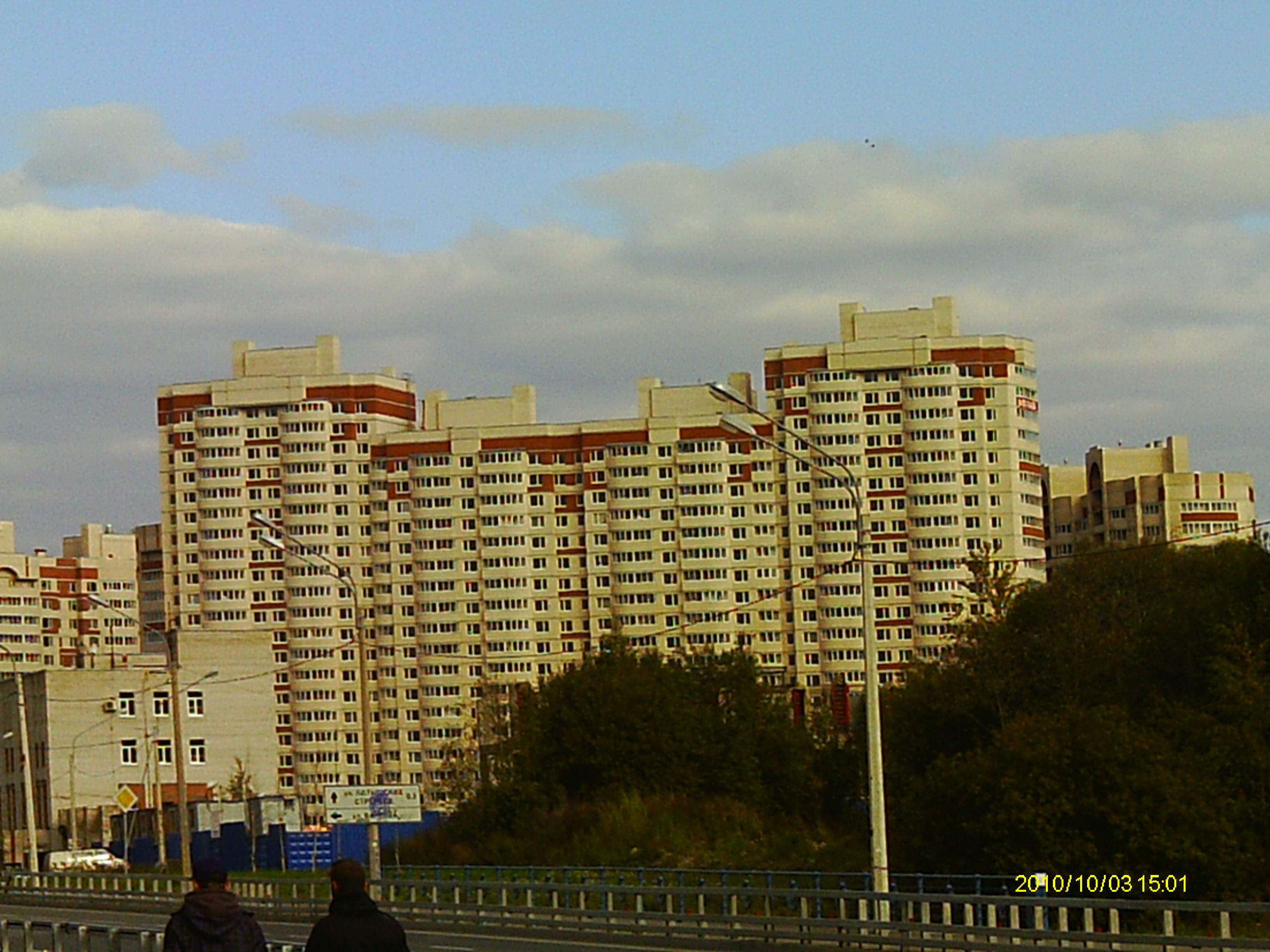 Улица Ворошилова (Невский район)